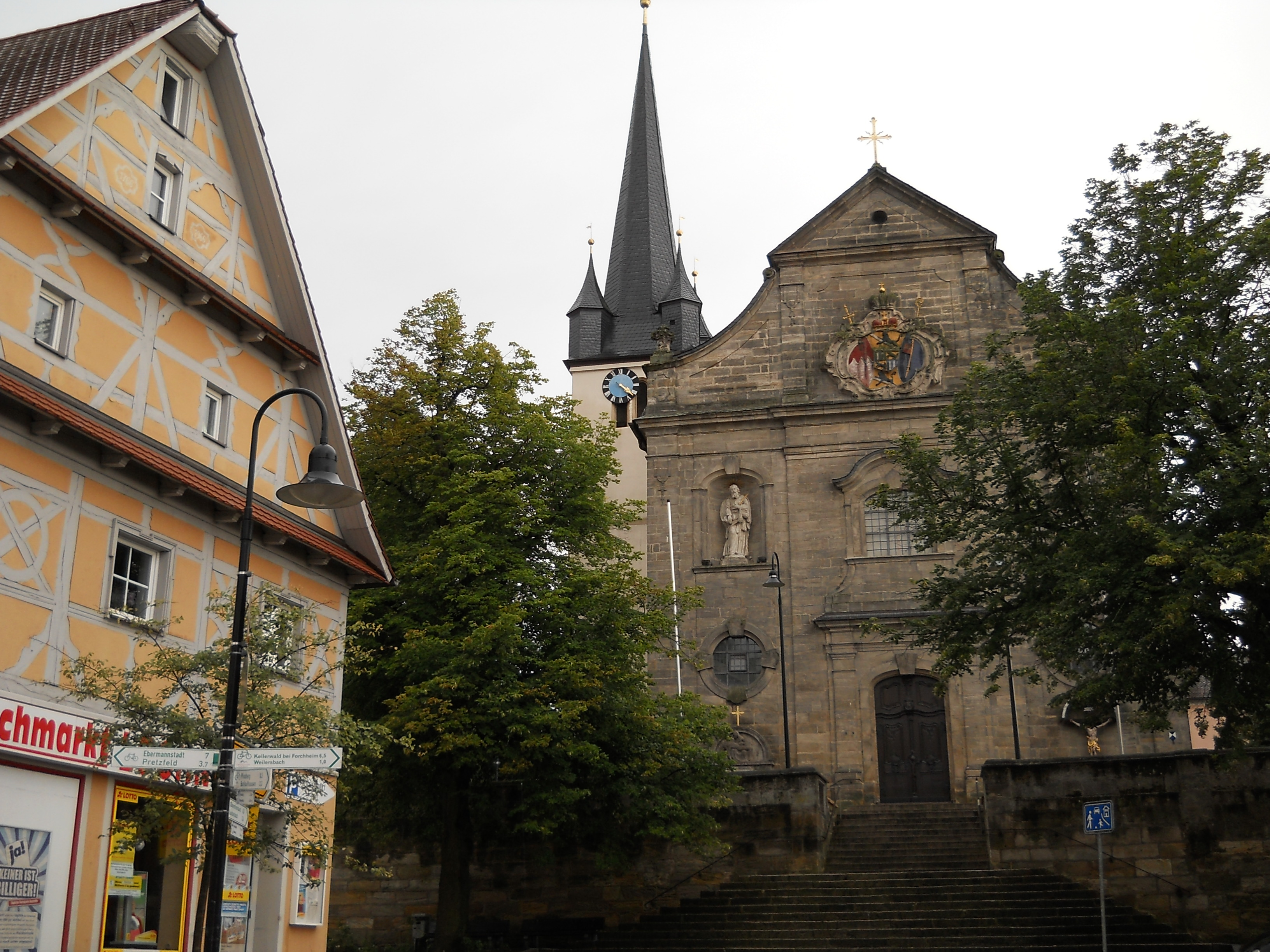 Kirchehrenbach in der Fränkischen Schweiz, Kath. Pfarrkirche St. Bartholomäus